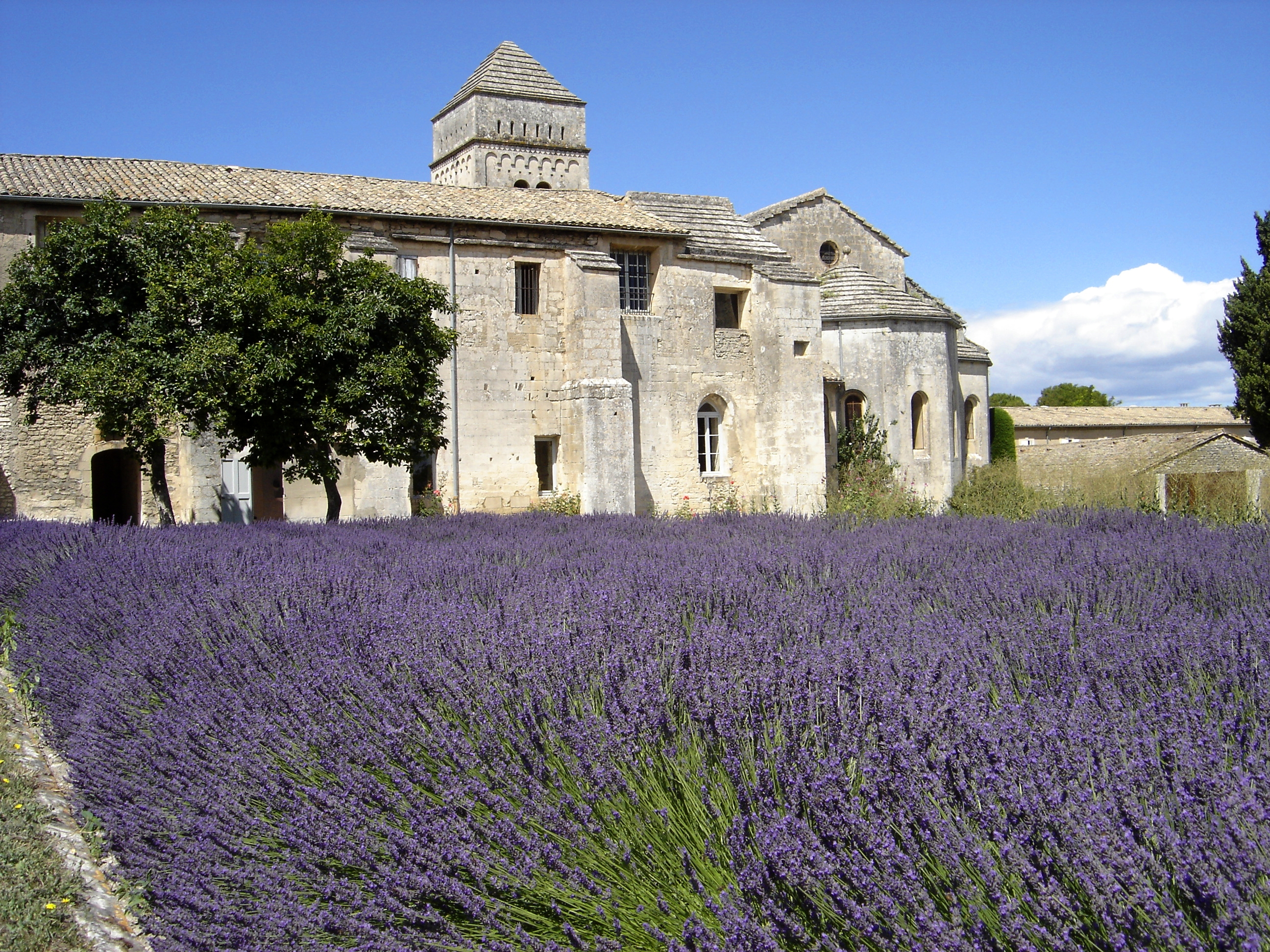 Le Monastère Saint-Paul-de-Mausole à Saint-Rémy-de-Provence (Bouches-du-Rhône, France).